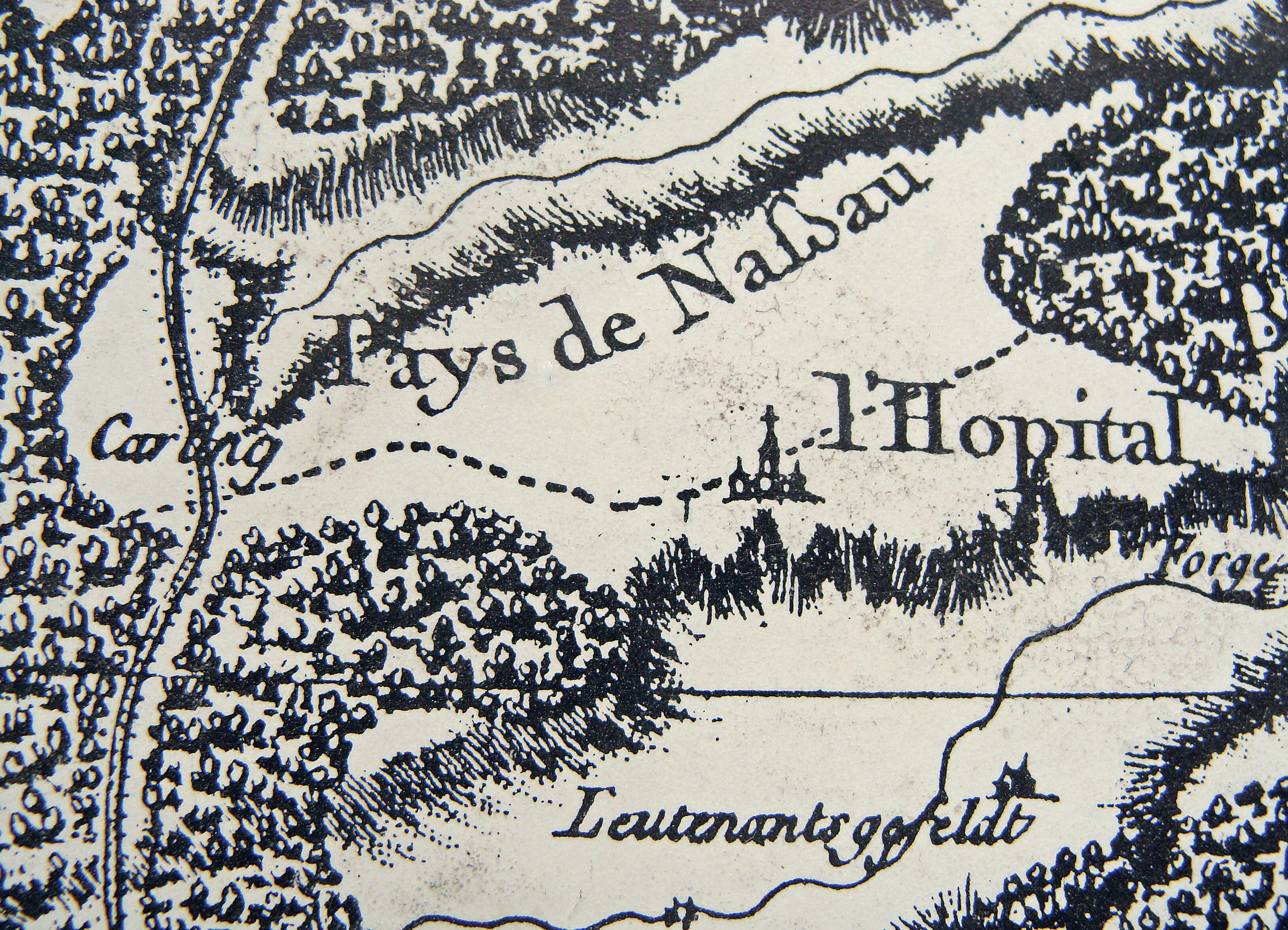 Extrait de la carte de Cassini avec les communes de Carling et de L'Hôpital (Lorraine). Carte du XVIIIe siècle.